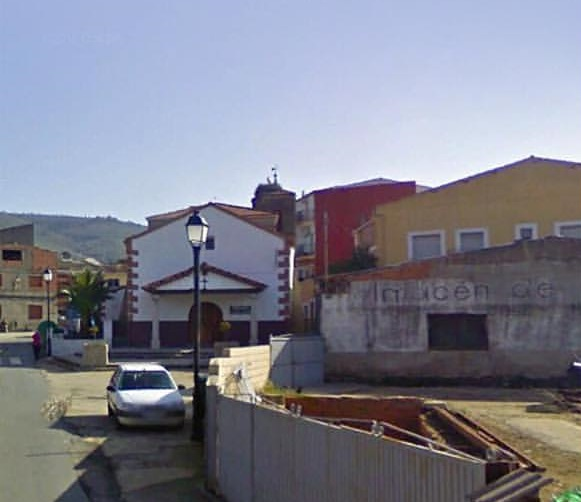 Iglesia y alrededores de la iglesia en el municipio español de Marchagaz, en la provincia de Cáceres. Cedida a Flickr bajo licencia Creative Commons por la Excma. Diputación de Cáceres.